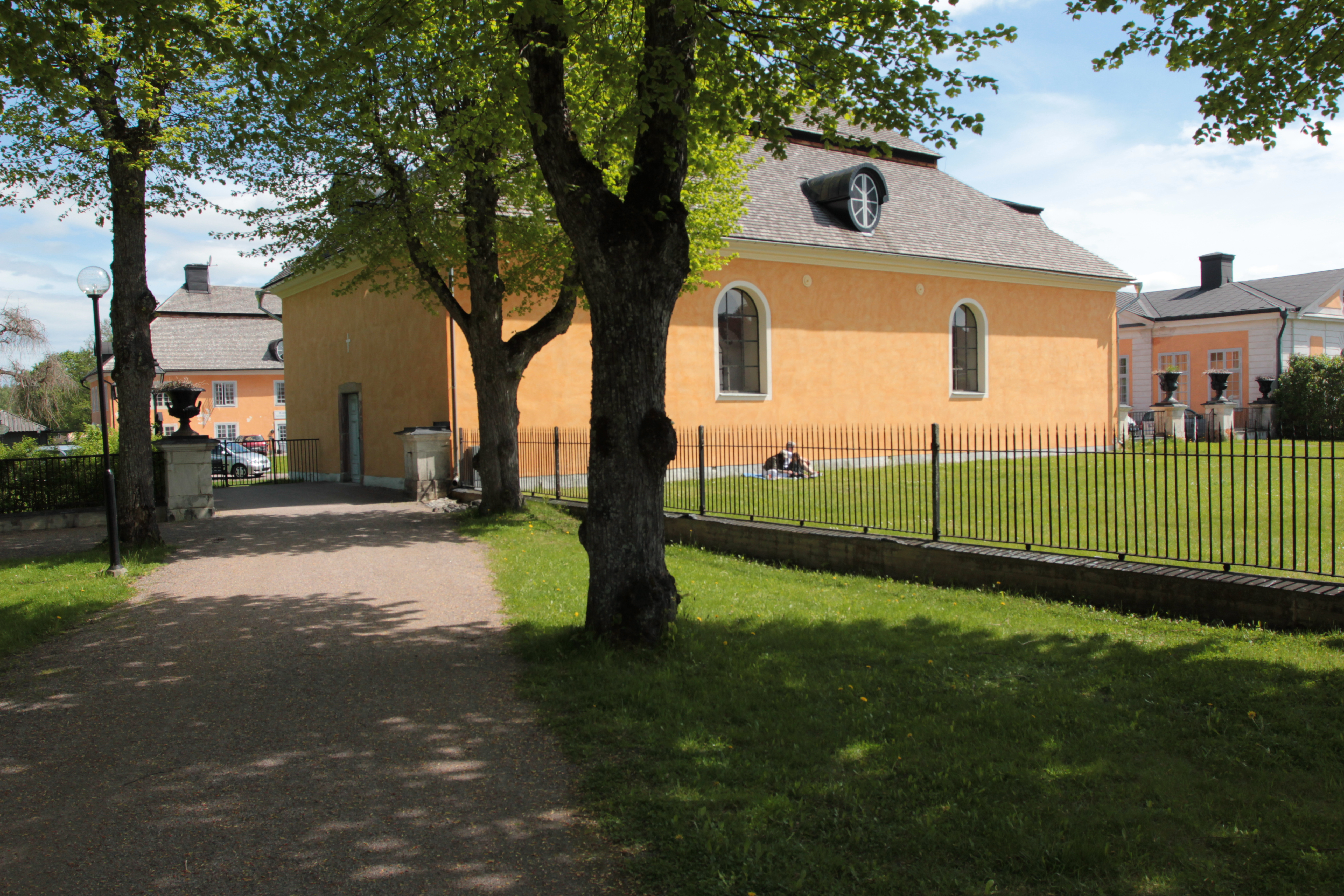 Österbybruks kyrka. Foto uppladdat som en del i Bergslagssafarin 26 maj 2012.